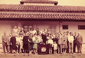 Se observa a varios integrantes de la Asociación Húngara del Paraguay, durante una reunión de confraternidad. Asunción, año 1975.